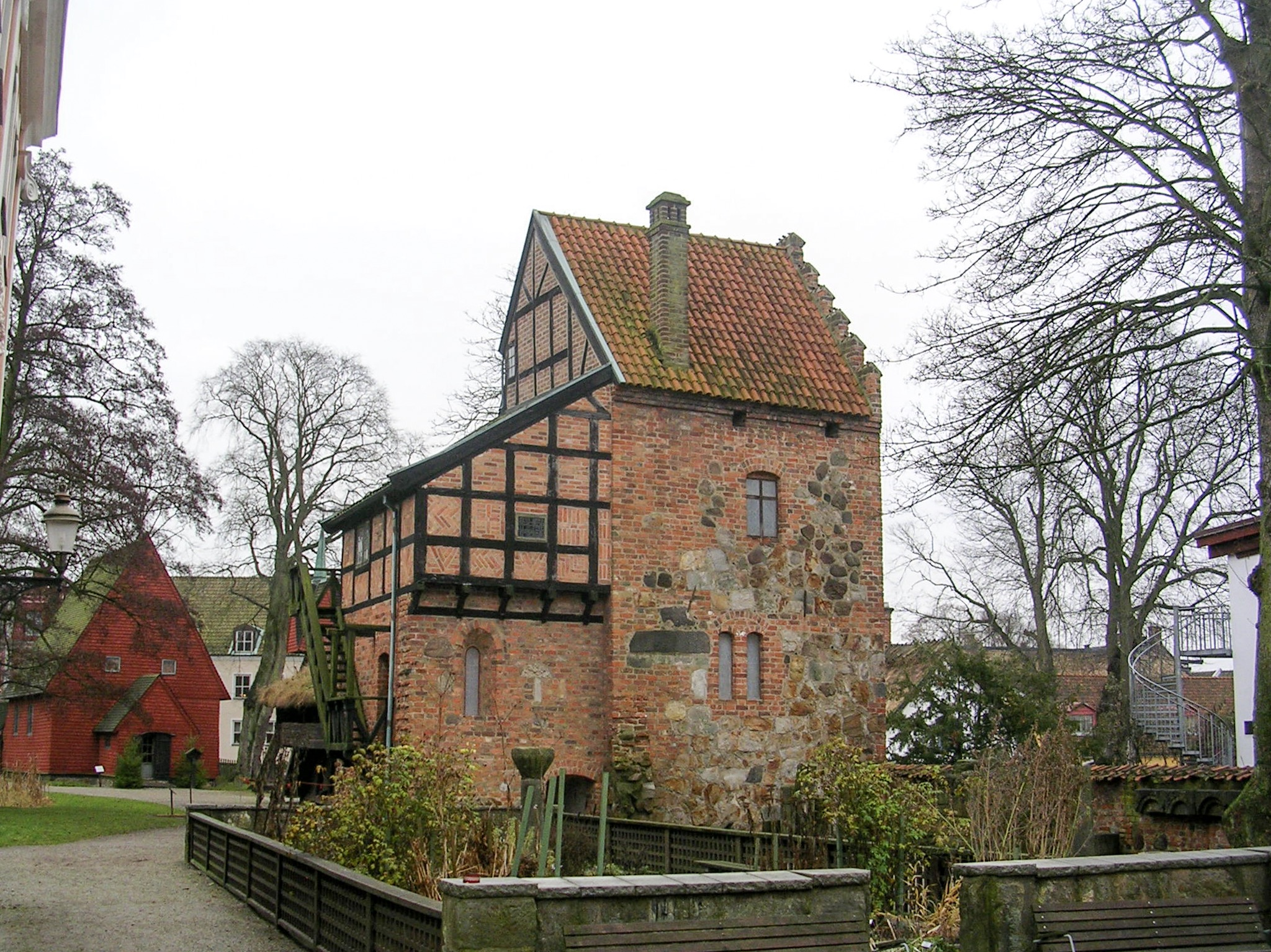 Dekanhuset at Kulturen in Lund Author: Väsk Date: December 2005